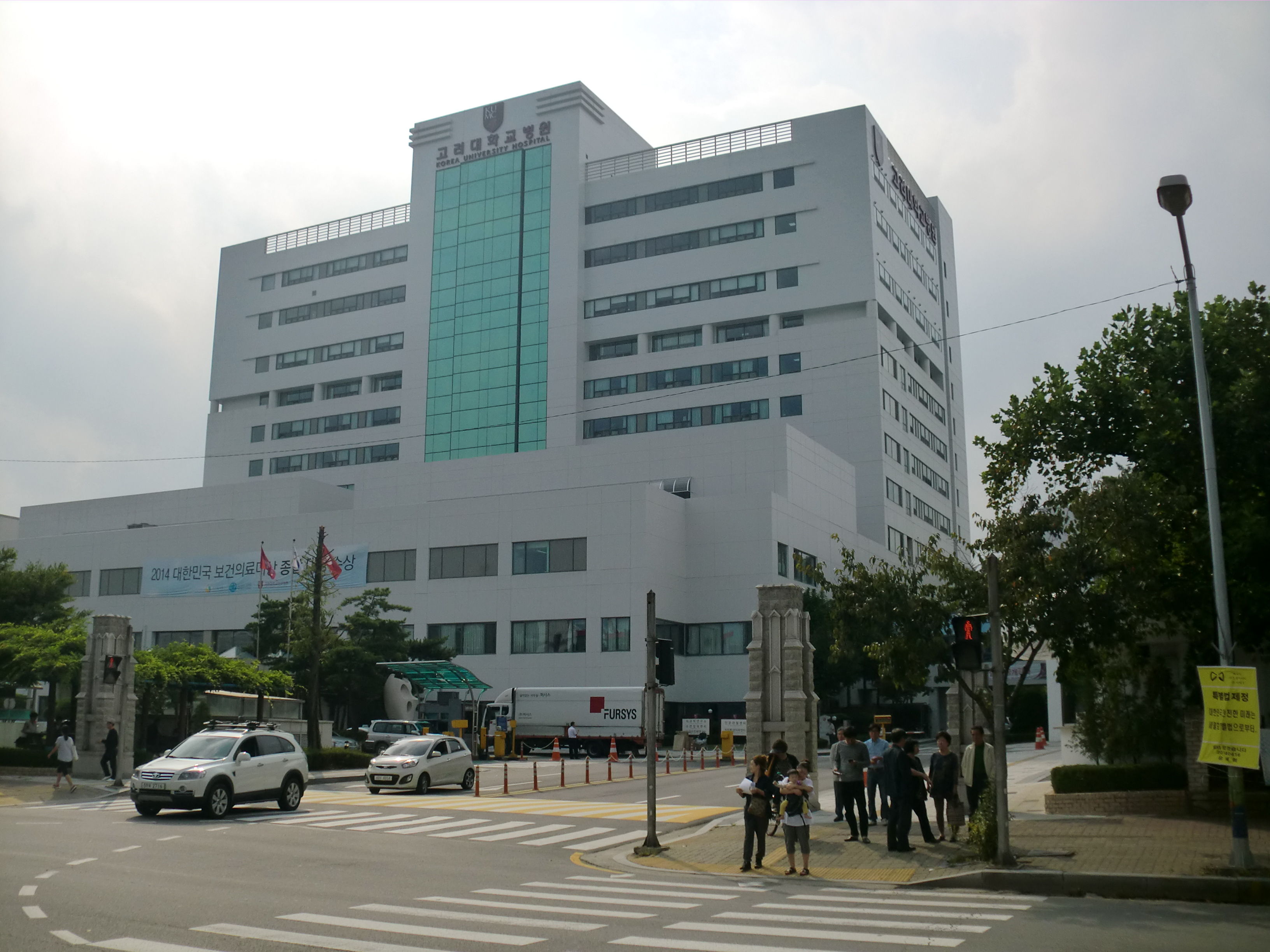 경기도 안산시에 있는 고려대학교 안산병원